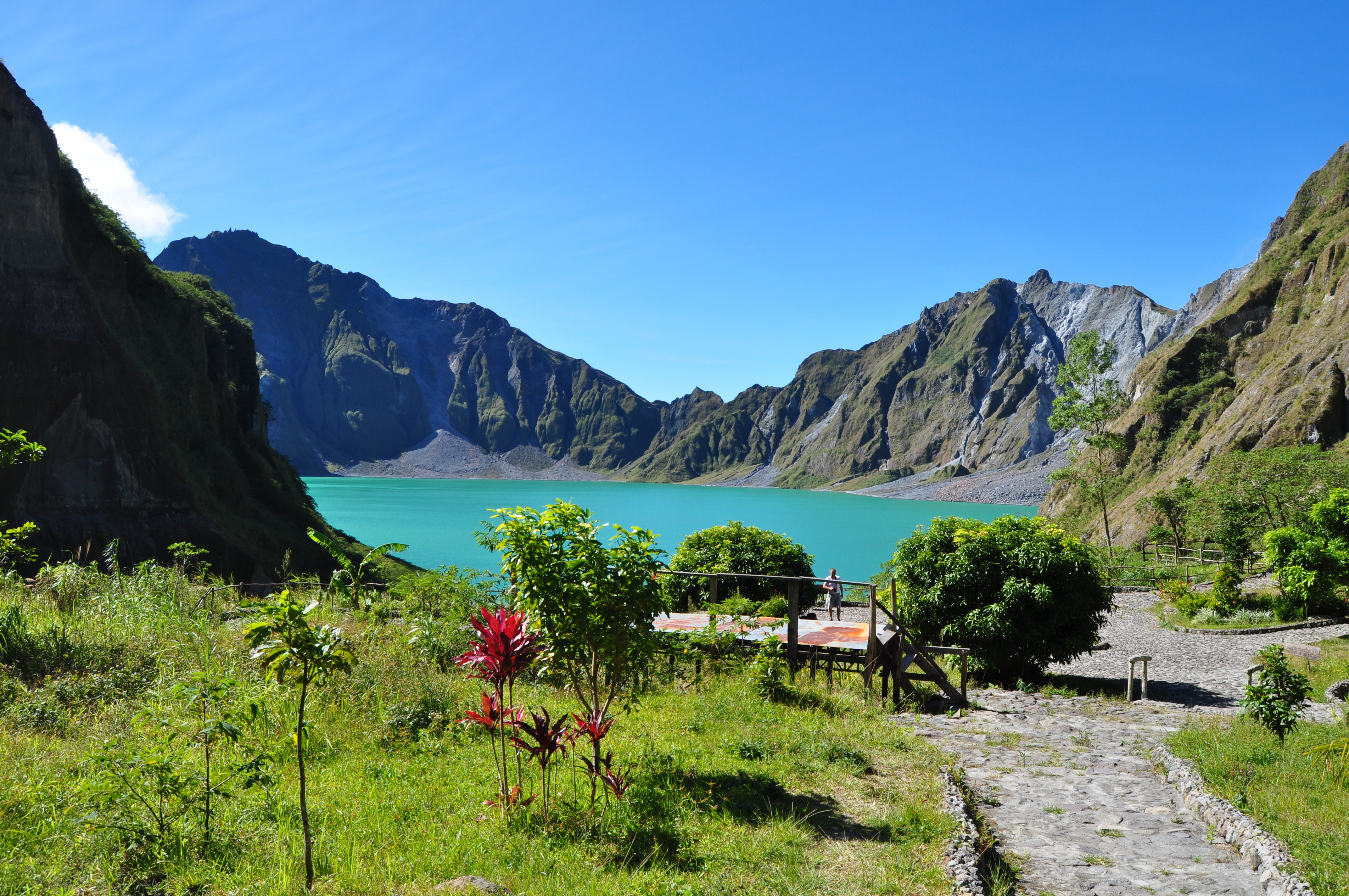 Mt Pinatubo trekking